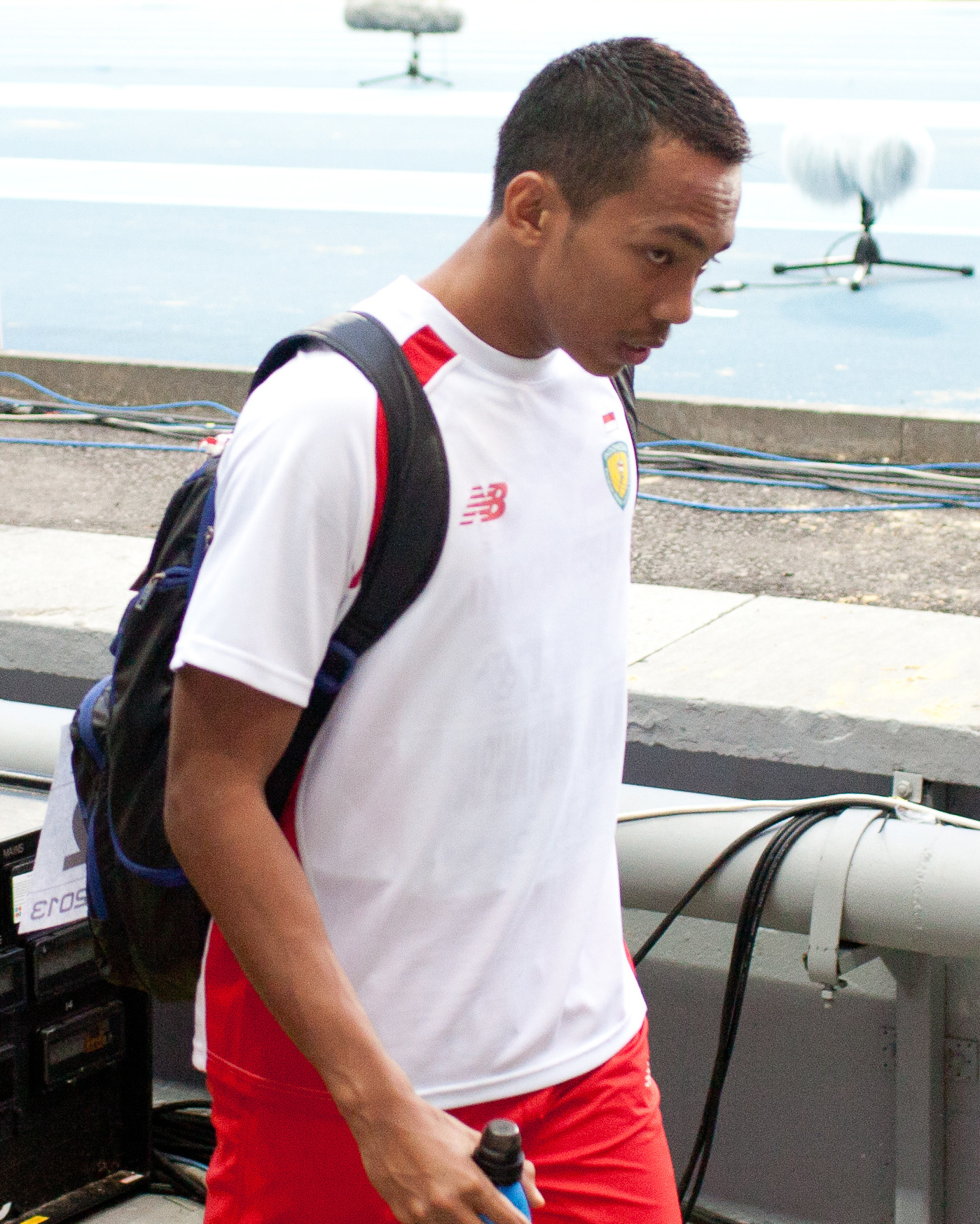 Первый день Чемпионата мира по легкой атлетике в Москве